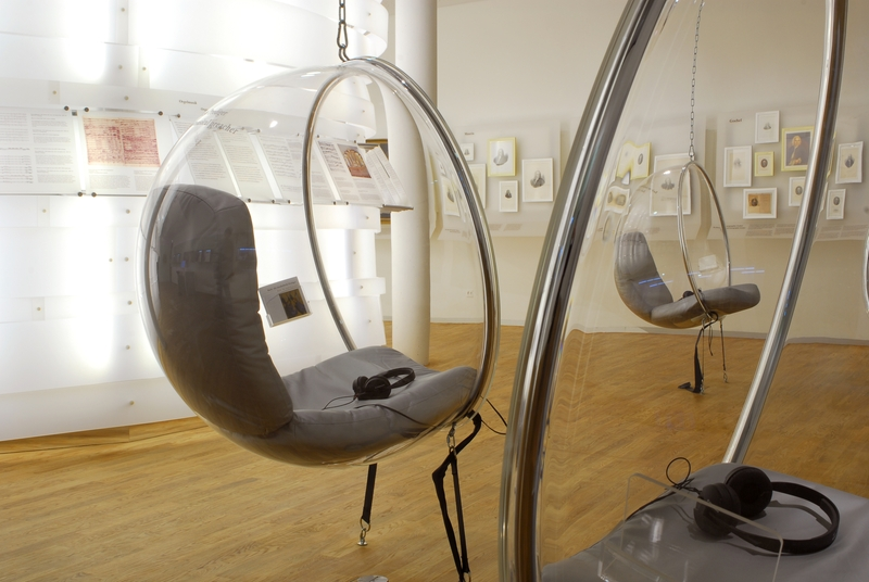 Bubble Chairs im Bachhaus Eisenach